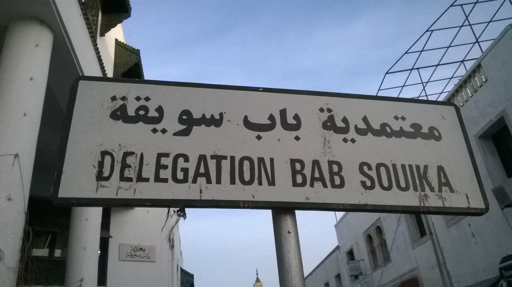 Bab Souika , Tunis باب سويقة ، تونس